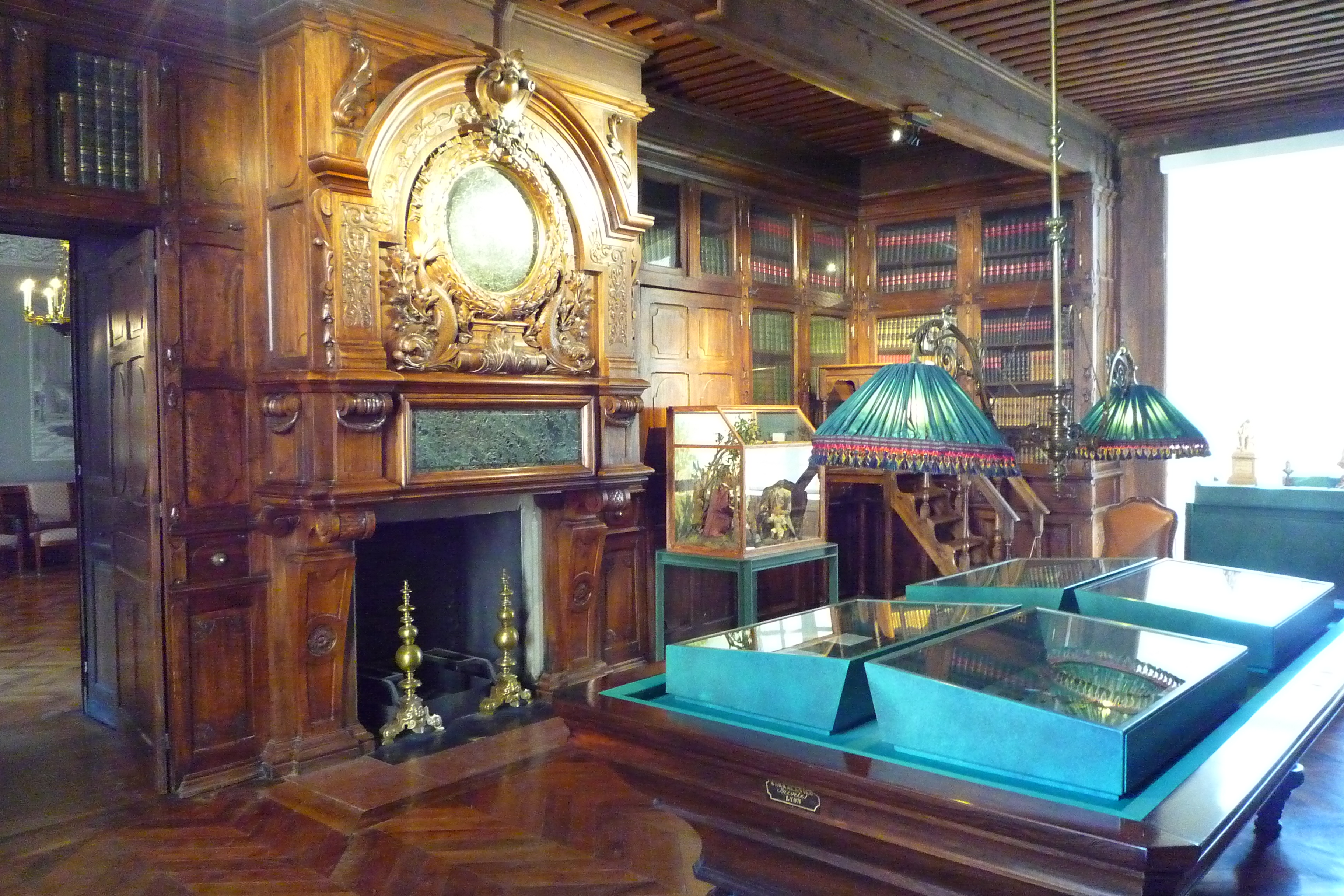 Bibliothèque-médaillier du château, niveau 3 du Musée de la Révolution française - Vizille.